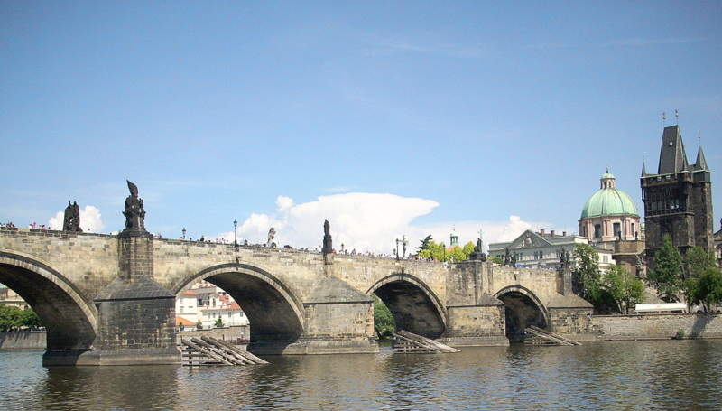 Karlův most, Staré Město a Malá Strana, mezi Křižovnickým náměstím a Mosteckou